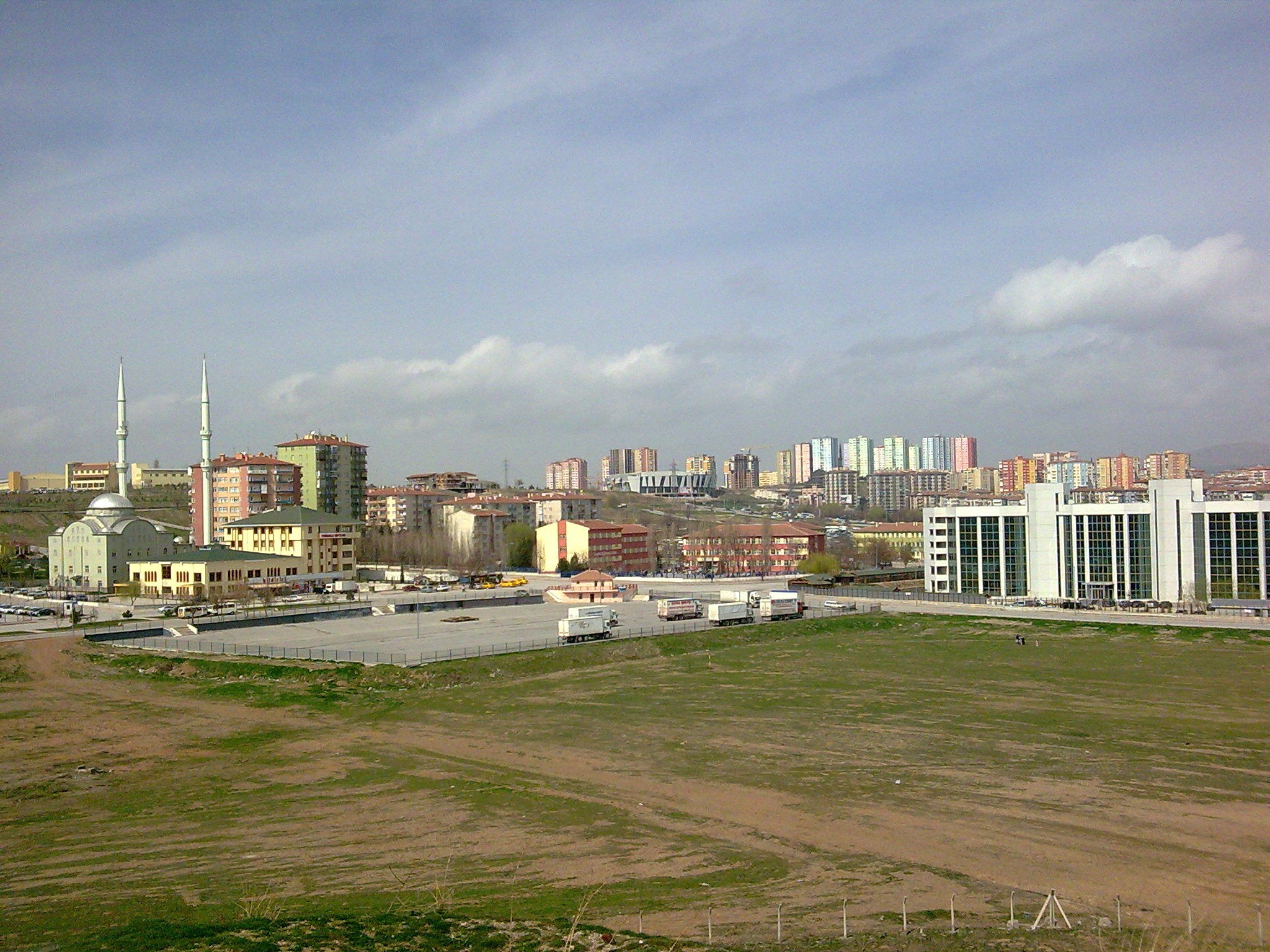 Yumurtatepe Tümülüsü'nden bir görünüm. Ortada görünen sarı-pembe desenli bina Alparslan Anadolu Lisesidir. Sol tarafta görünen binalar ve yakındaki binalar Çamlıca Mahallesi, ortada ve ileride görünen farklı renklerdeki yüksek binalar Urankent ve Urankent'in sağ tarafında kalan binalar ise Demetevler Mahallesine bağlıdır. Tümülüsün önünde görünün boş alan askeriye aittir. Tırların göründüğü yer halk pazarıdır.